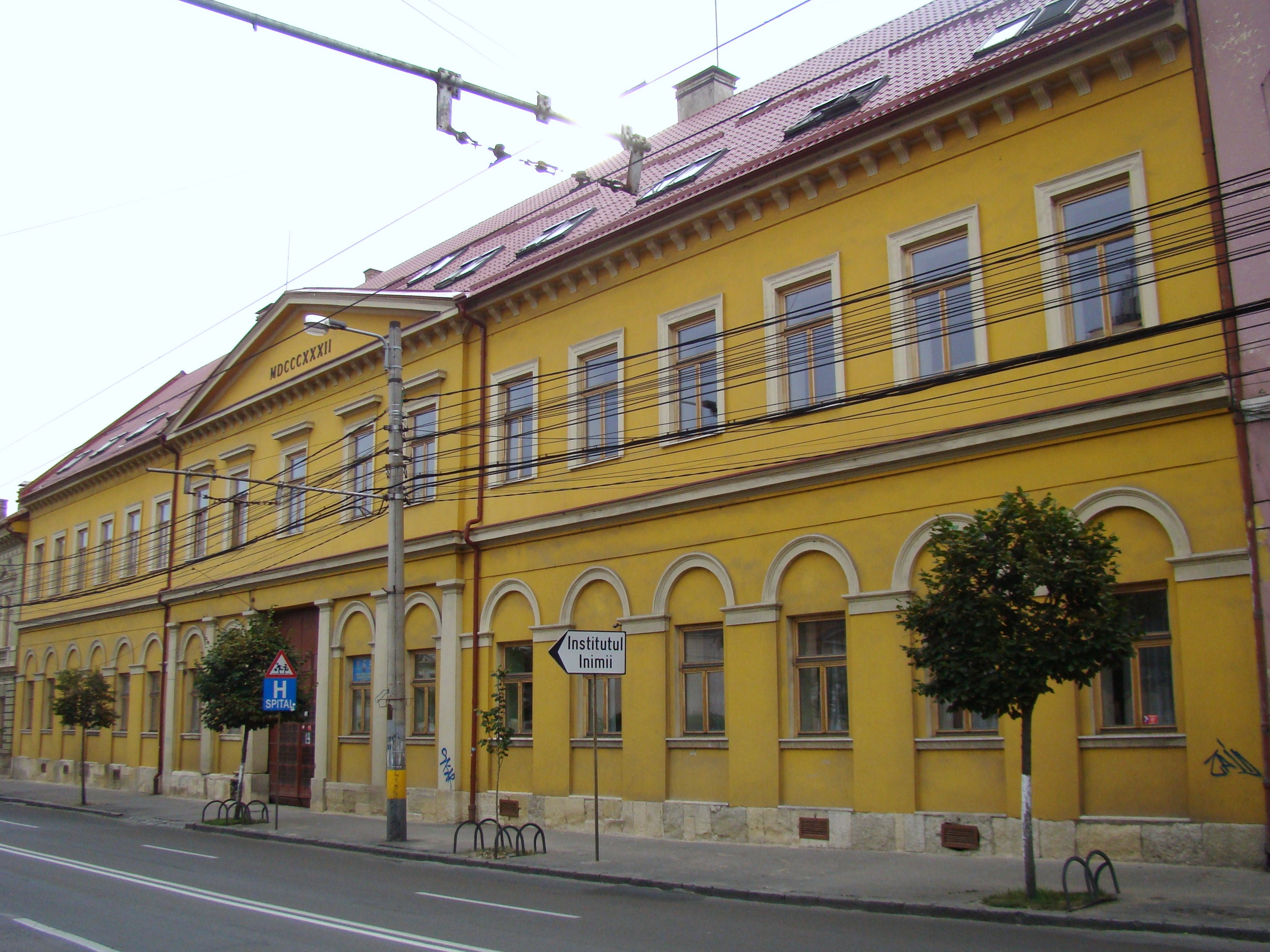 Clădire monument istoric, Calea Moților, nr. 24 (în prezent Seminarul Teologic “Sf. Ioan Evanghelistul”)